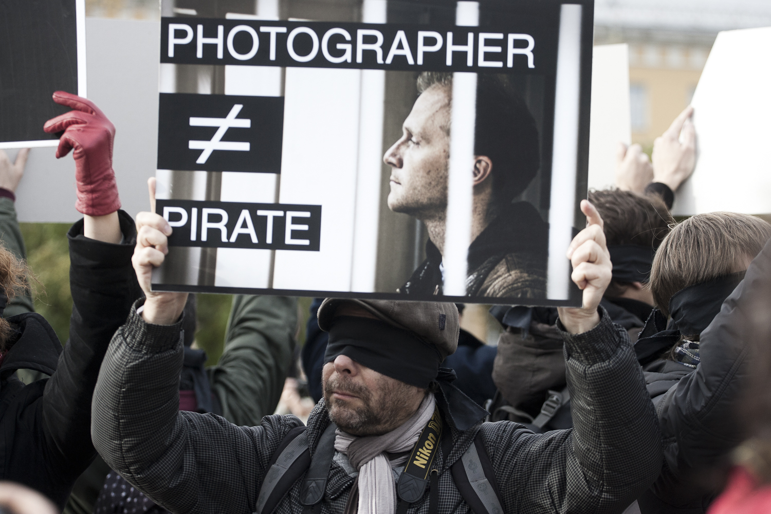 canon 70-200 f4 L